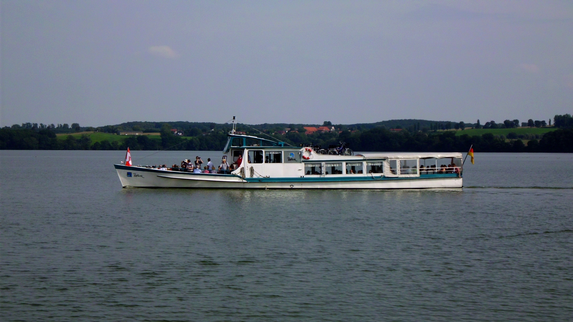 Linienschiff „Rehtra“ auf der Lieps.